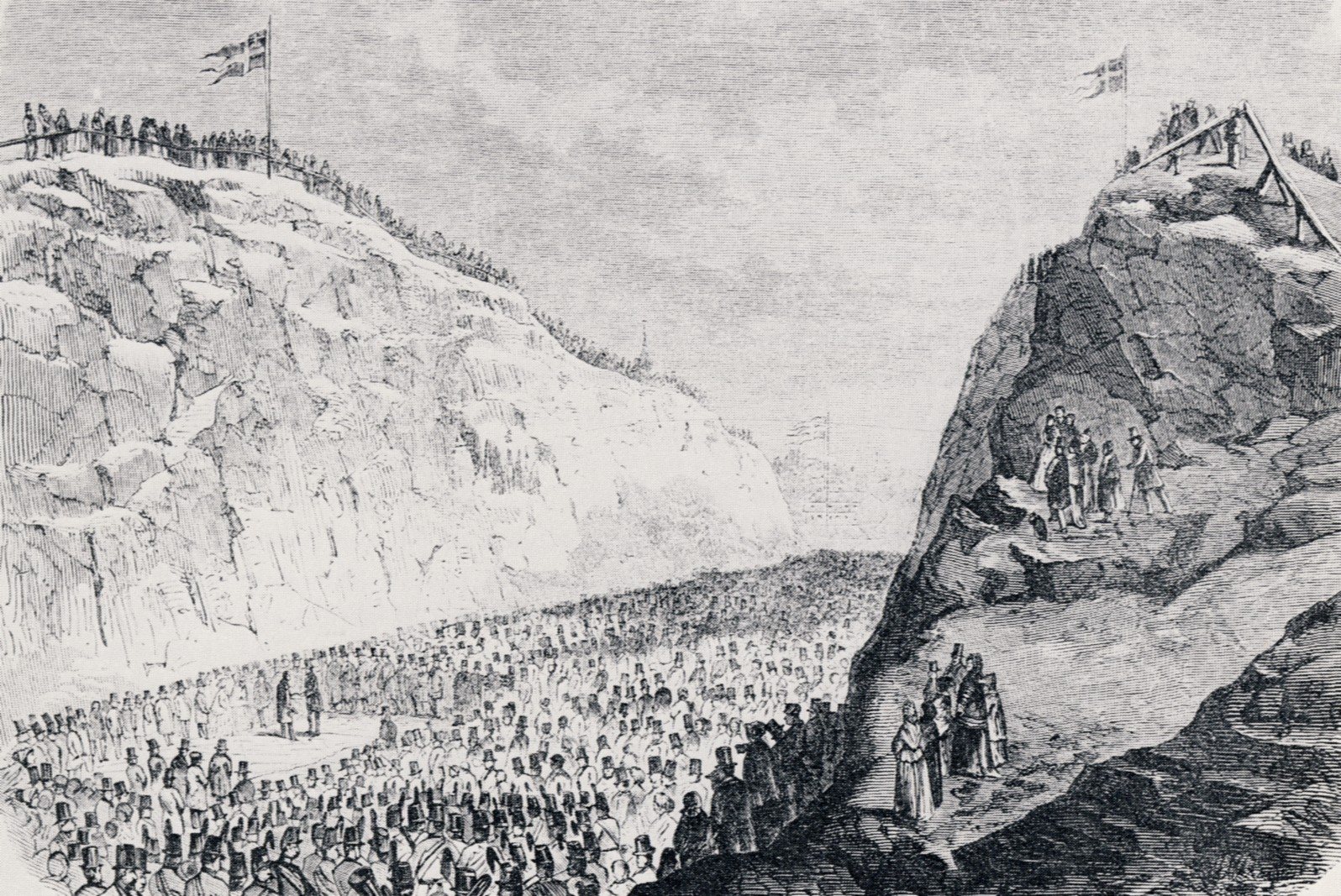 Invigningen av Karl XV:s Port på Östermalm i Stockholm